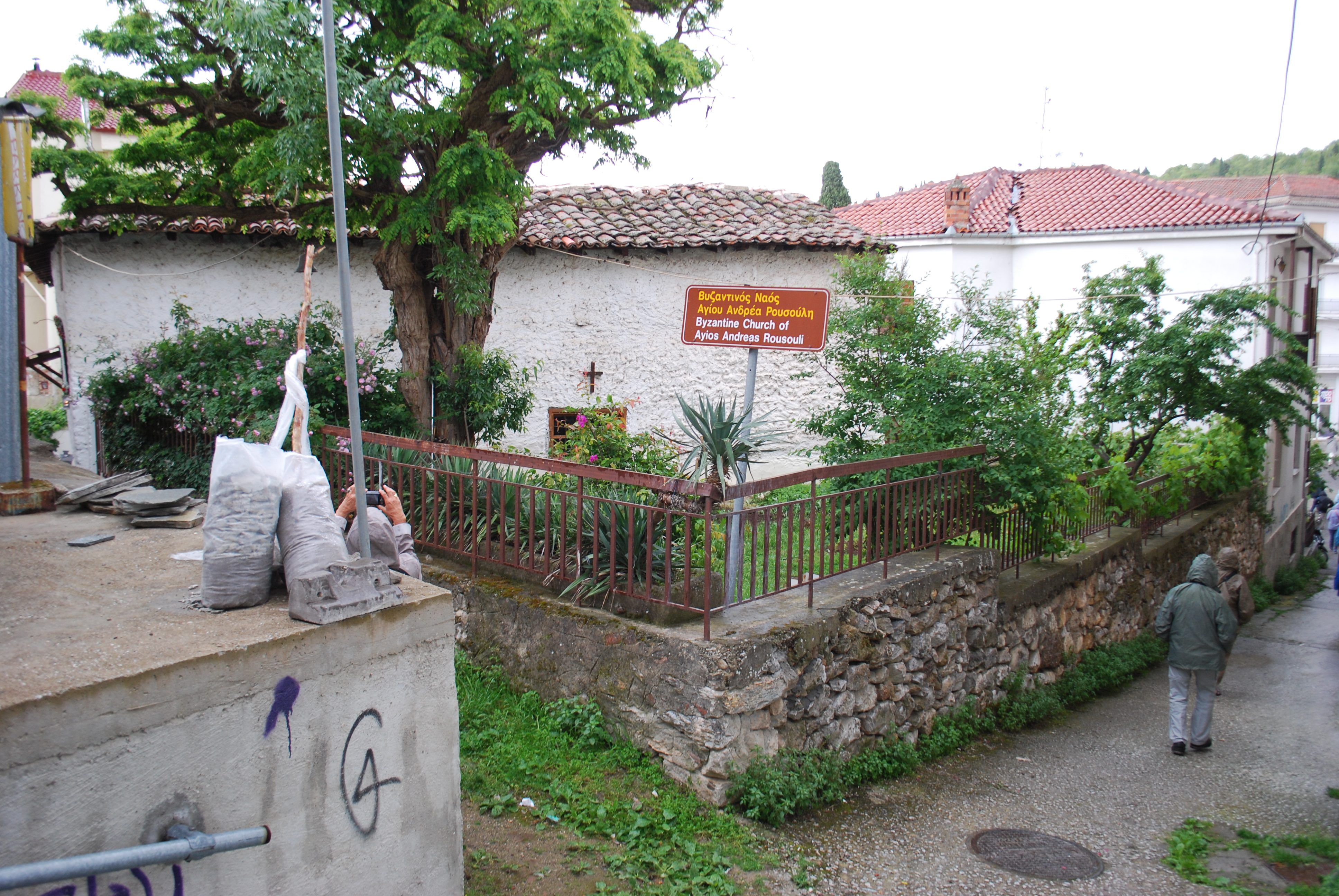 Vue de Kastoria.